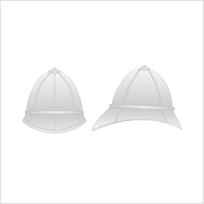 臺灣總督府頭盔帽Government-General of Taiwan official when the summer,they use pith helmet.Redraw Government-General of Taiwan Gazette.